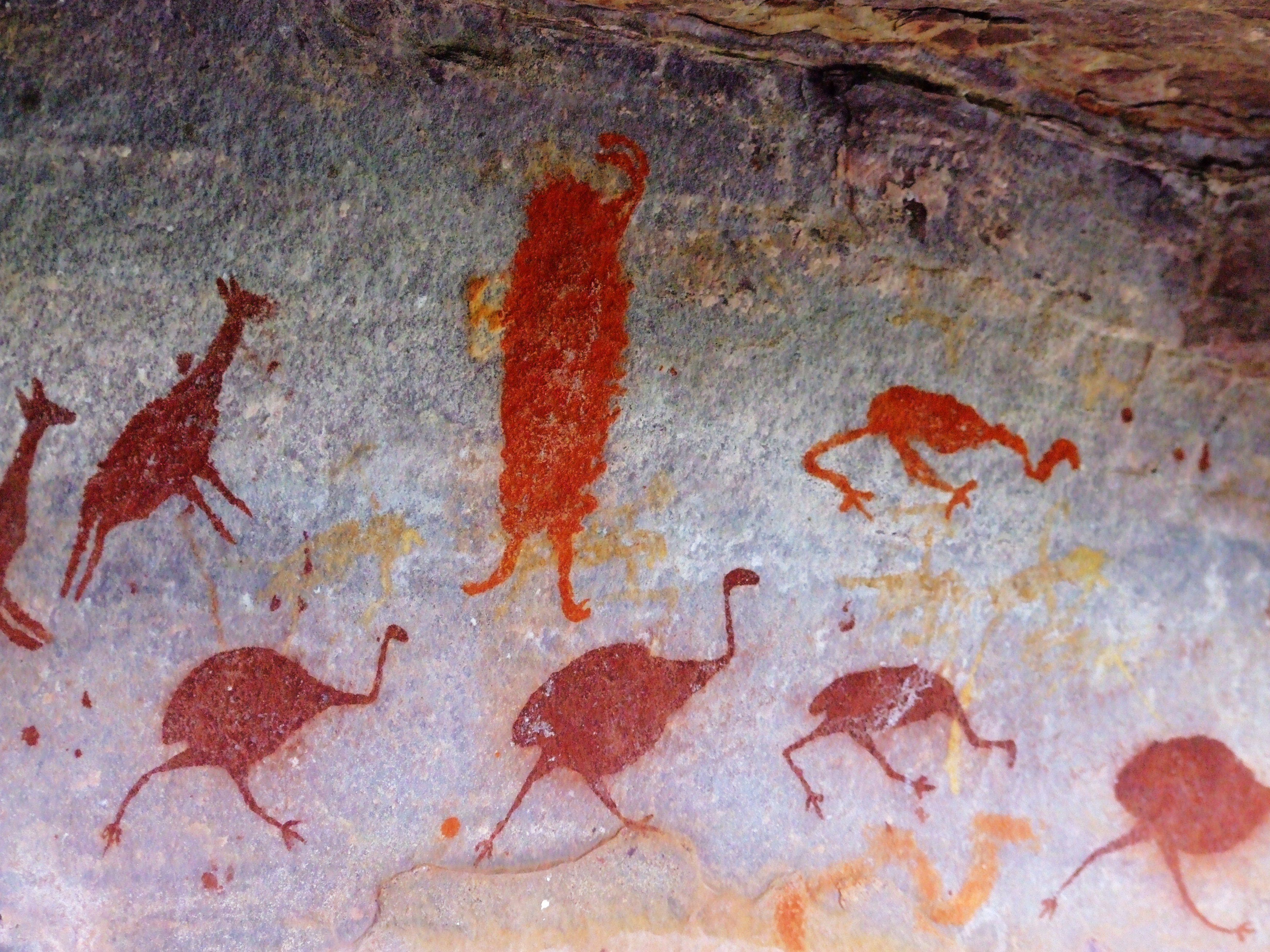 Parte de um painel, de pinturas rupestres, localizado em abrigo sob rochas na Chapada Diamantina Norte.